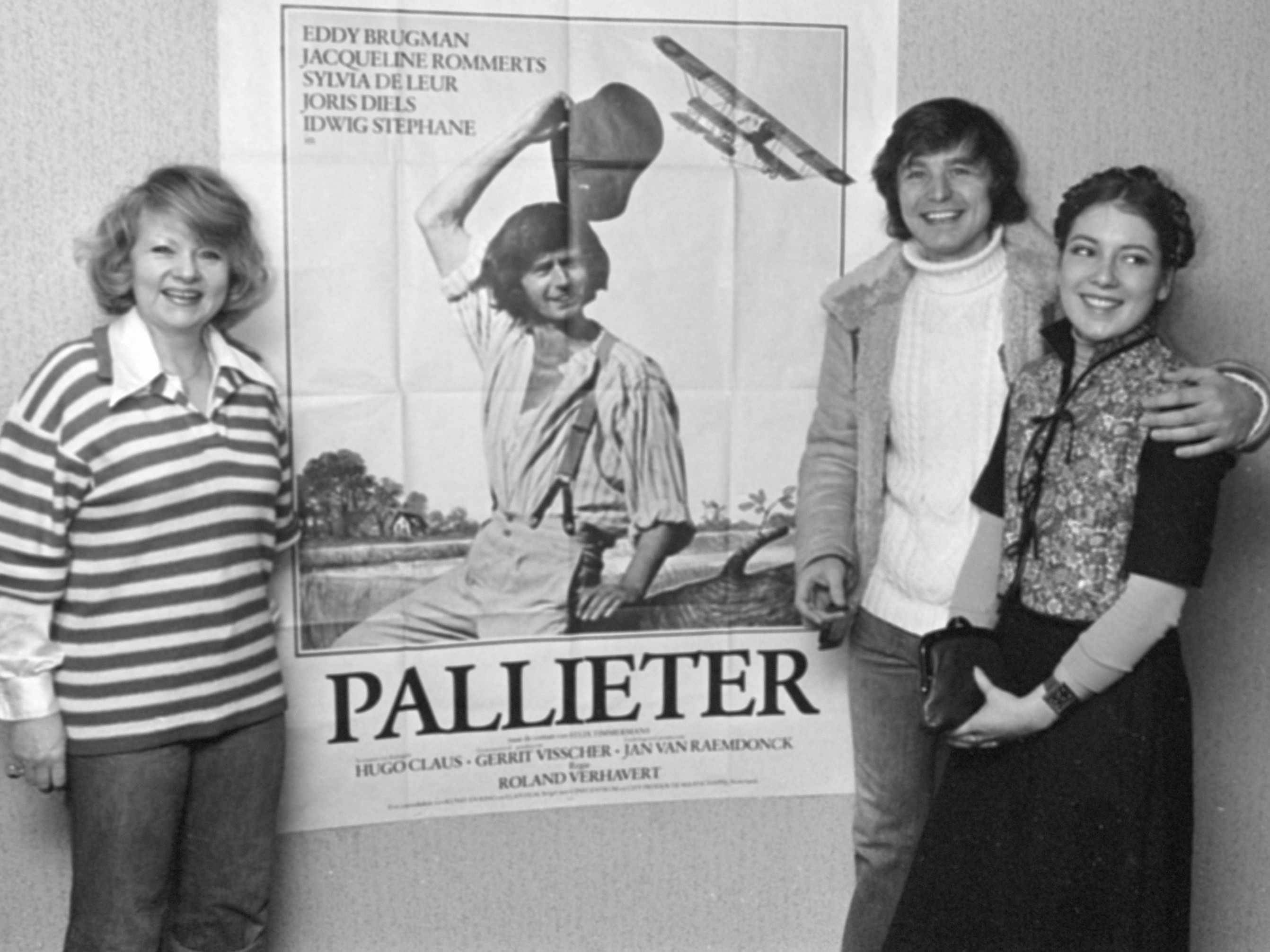 Perspremiere van de nieuwe Nederlandse film "Pallieter" in City, Amsterdam; v.l.n.r. Sylvia de Leur, Eddy Brugman en Jacqueline Rommerts 17 februari 1976